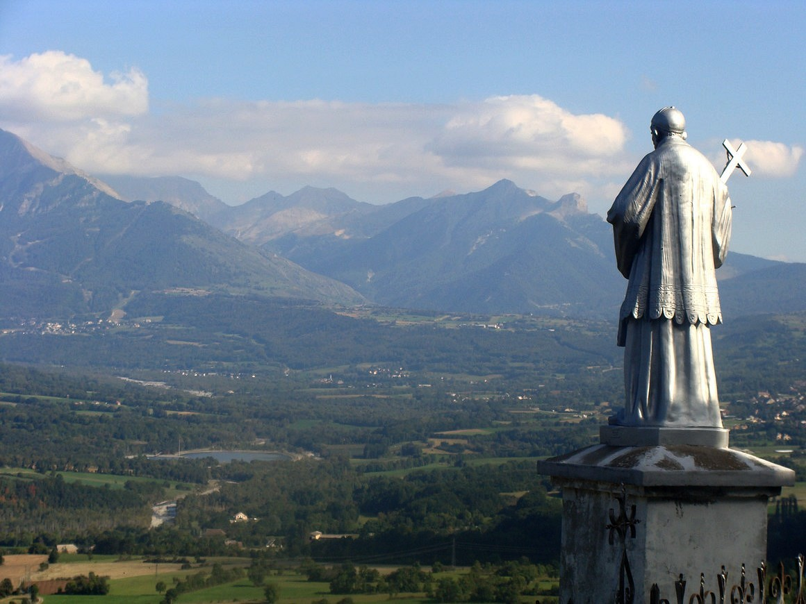 Le Champsaur vu de Notre-Dame de Boisvert. En bas, le plan d'eau du Champsaur. Au fond, les Autanes (alt. max. 2782 m.)